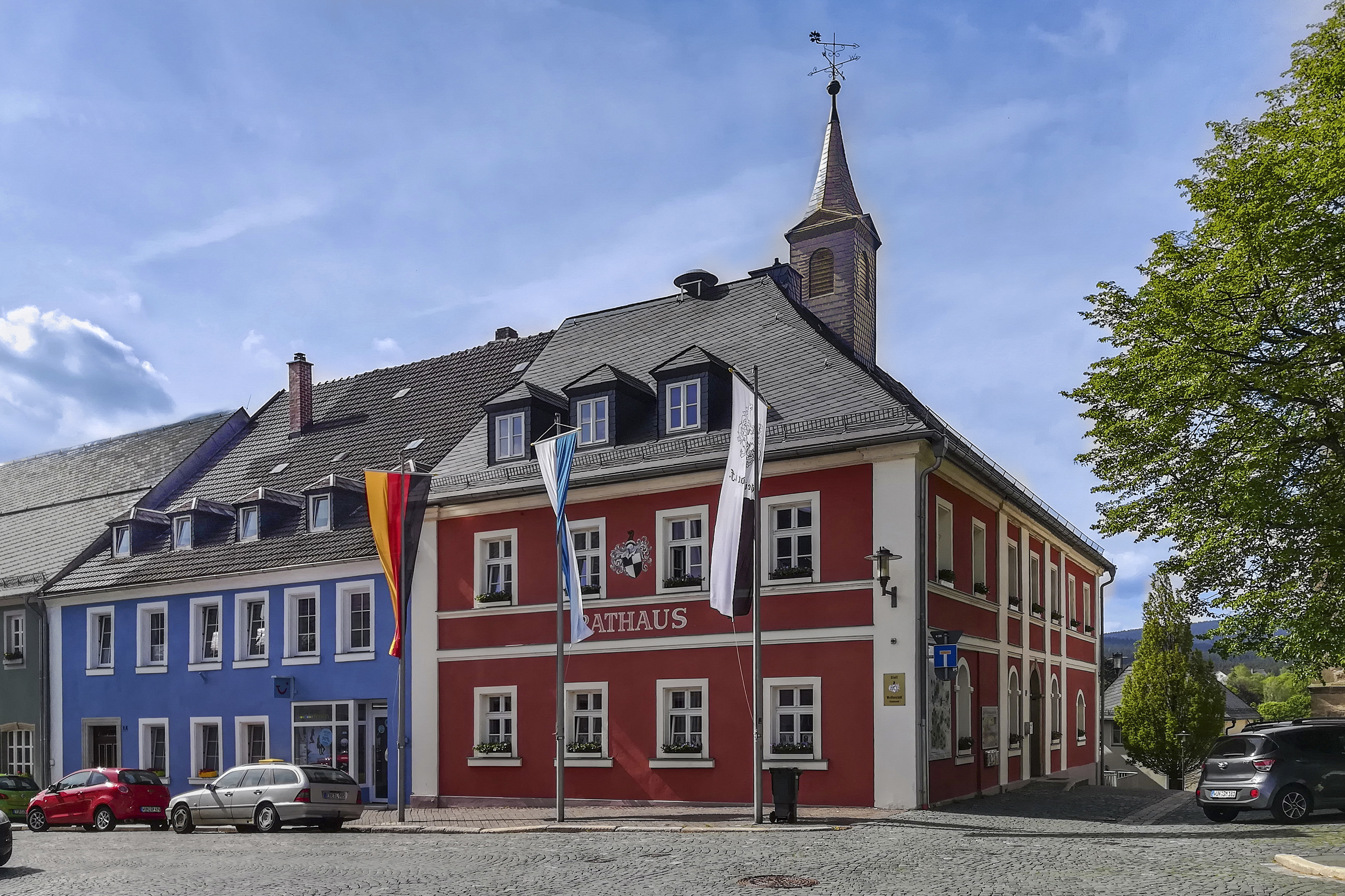 Zweigeschossiger Bau mit Lisenengliederung, abgewalmtes Schieferdach mit Dachreiter, 1828 begonnen nach Plänen von Johann Andreas Ritter, mit Ausstattung.